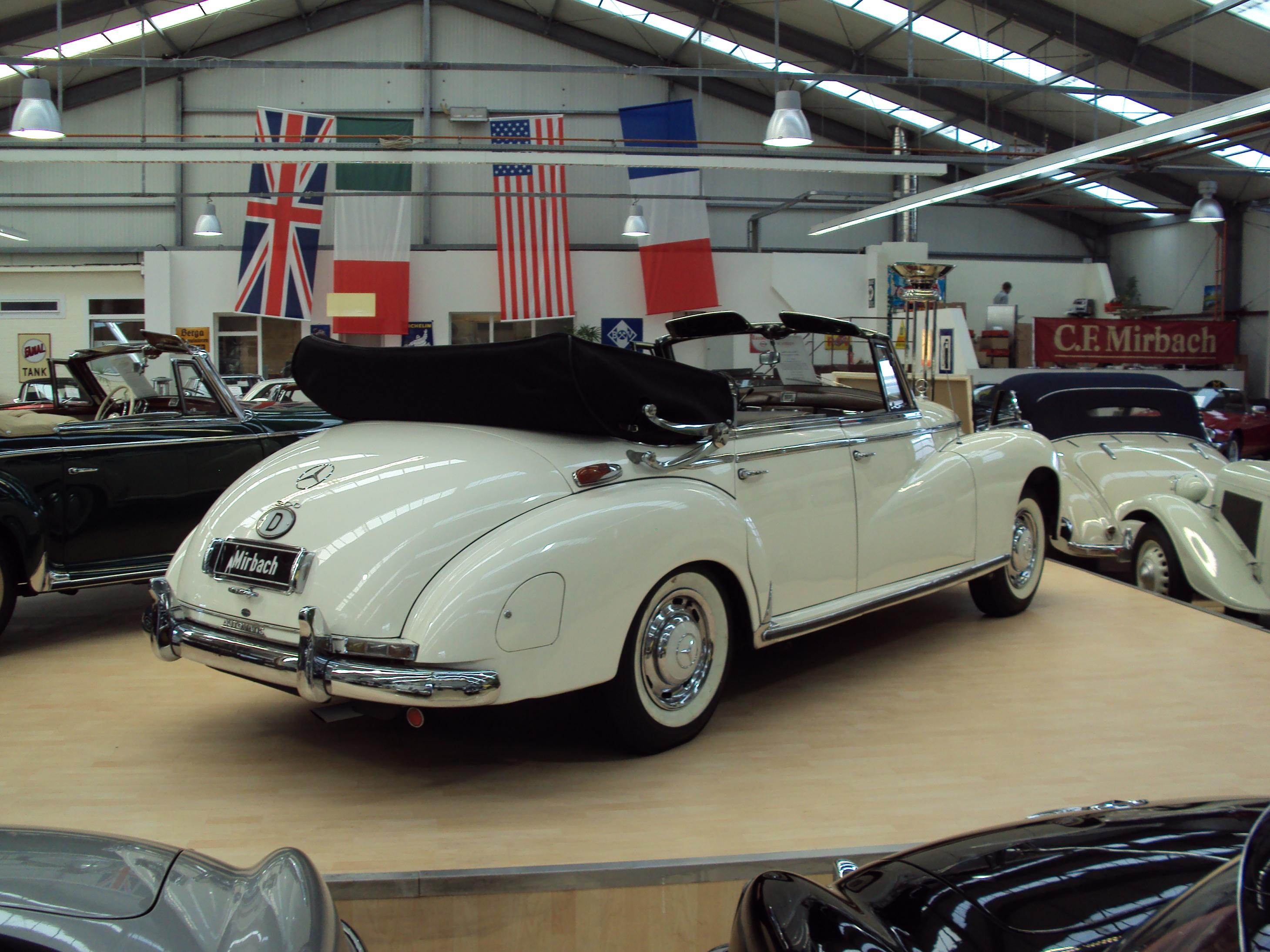 C.F Mirbach, Hamburg